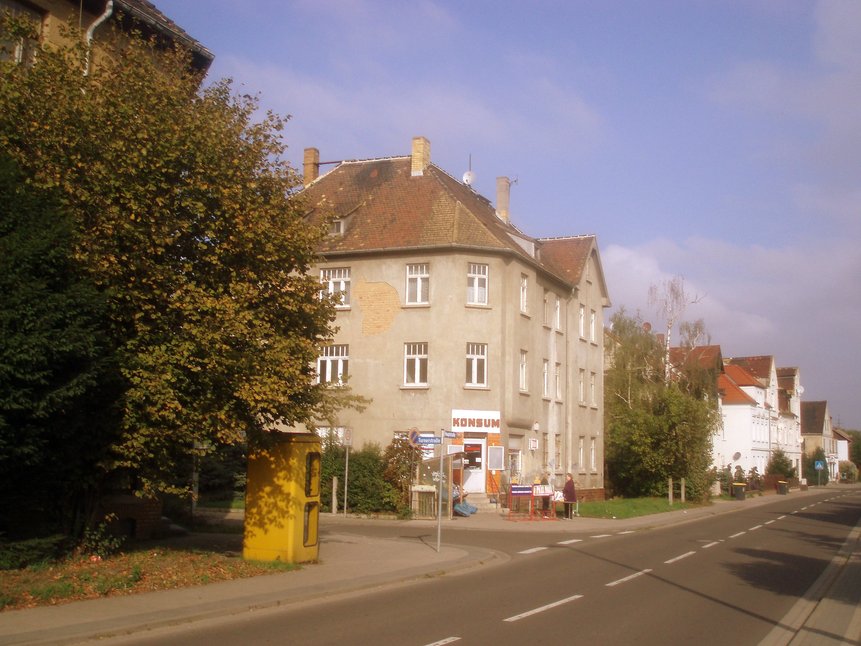 Hauptstraße in Großdeuben -Blickrichtung Norden